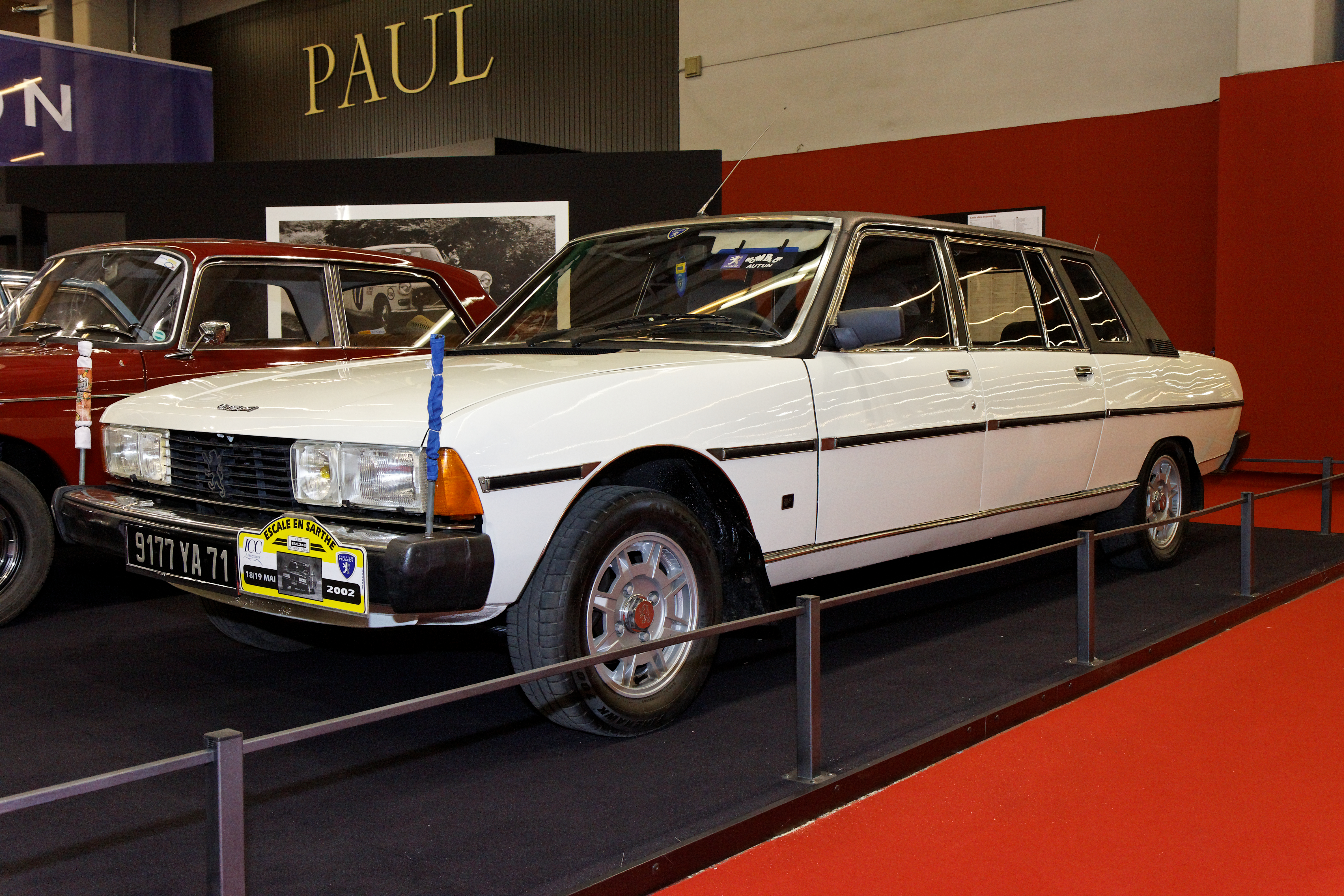 Photographie prise lors du salon rétromobile 2011 à Paris, porte de Versailles.